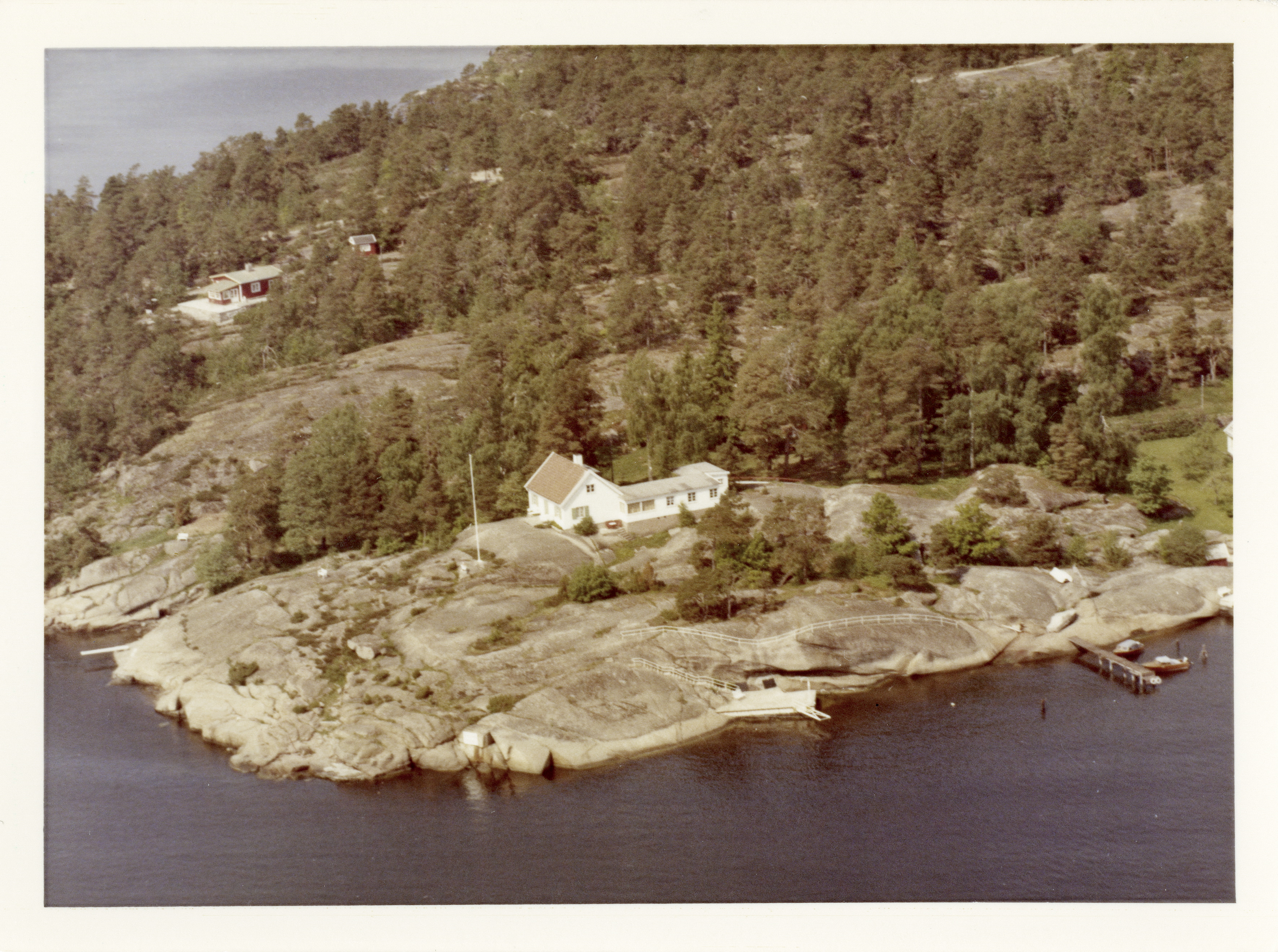 WF.S.164434